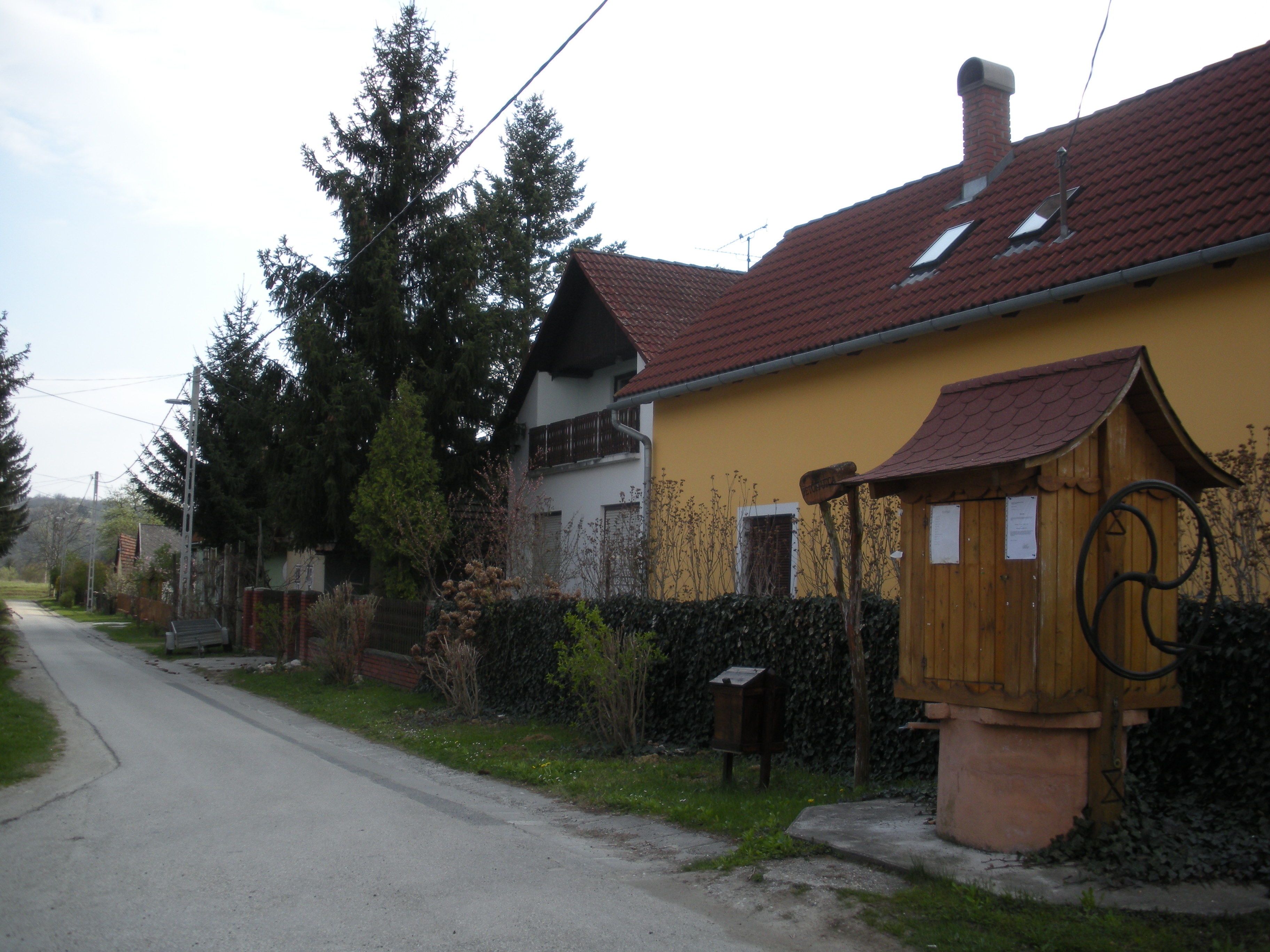 Az ún. zalamerenyei Újfalu utcaképe (Petőfi Sándor utca), Zalamerenye, Zala megye